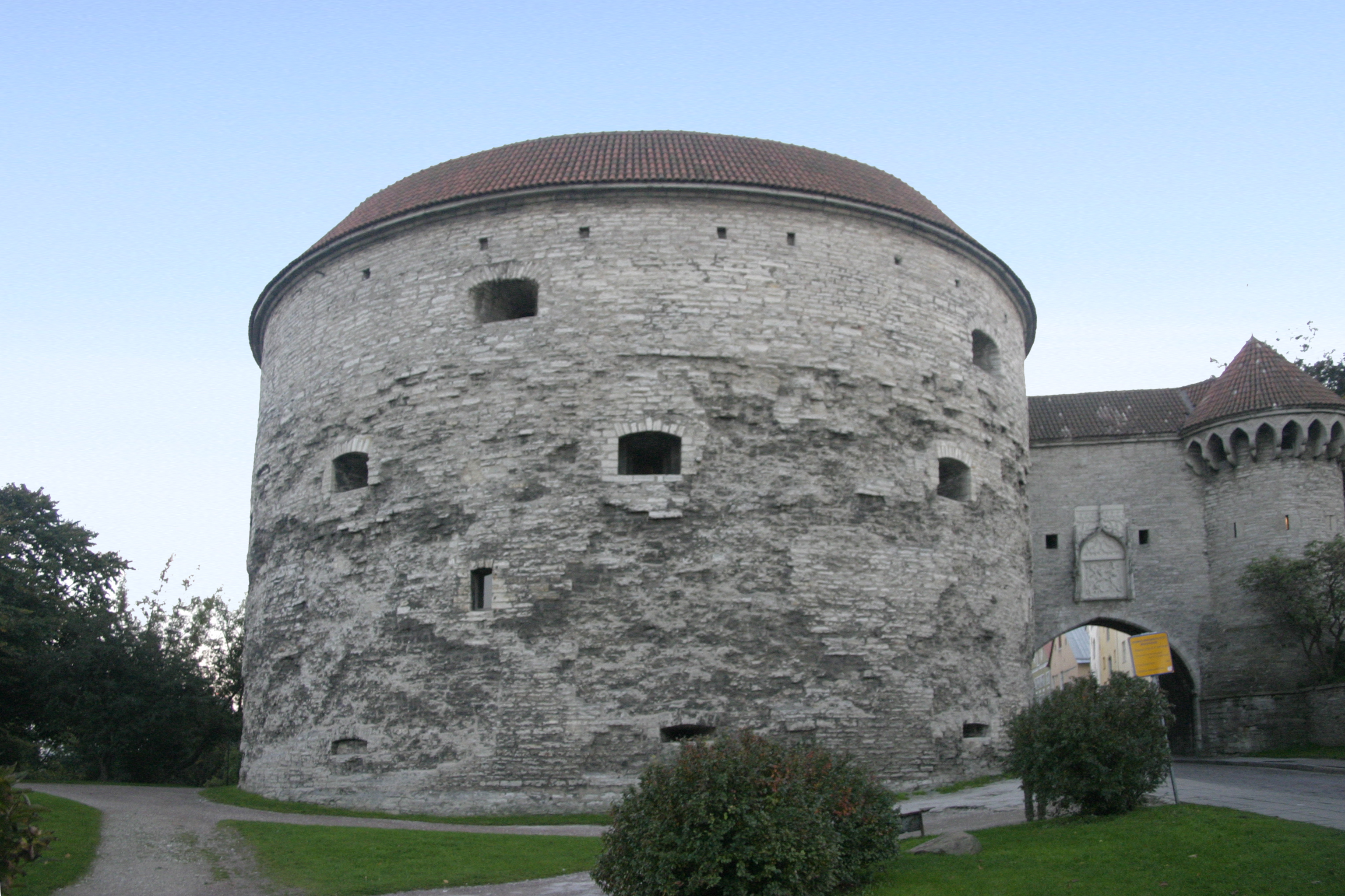 Fat Margaret, Tallinn.